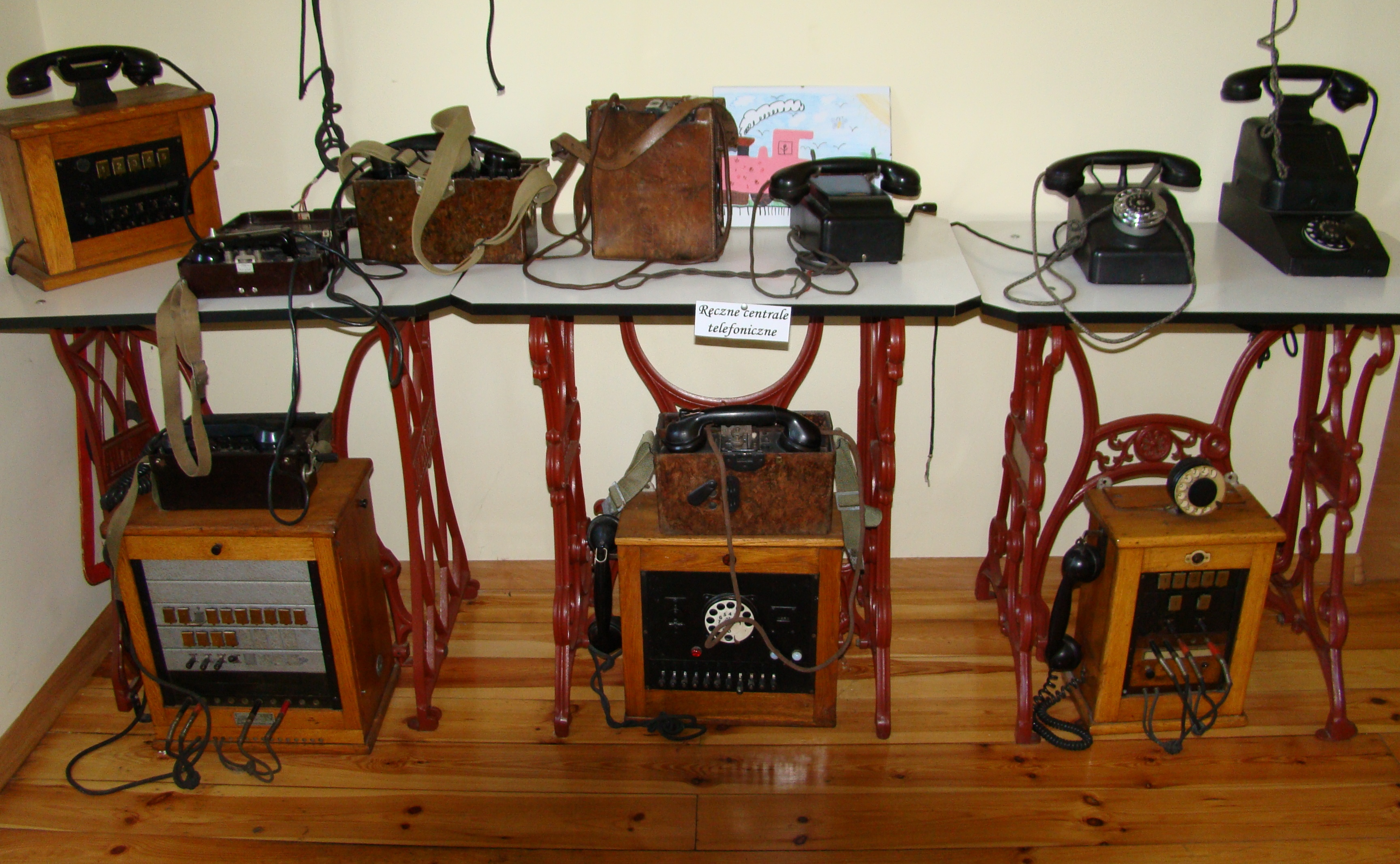 Muzeum Zabytków Kolejnictwa w Ełku